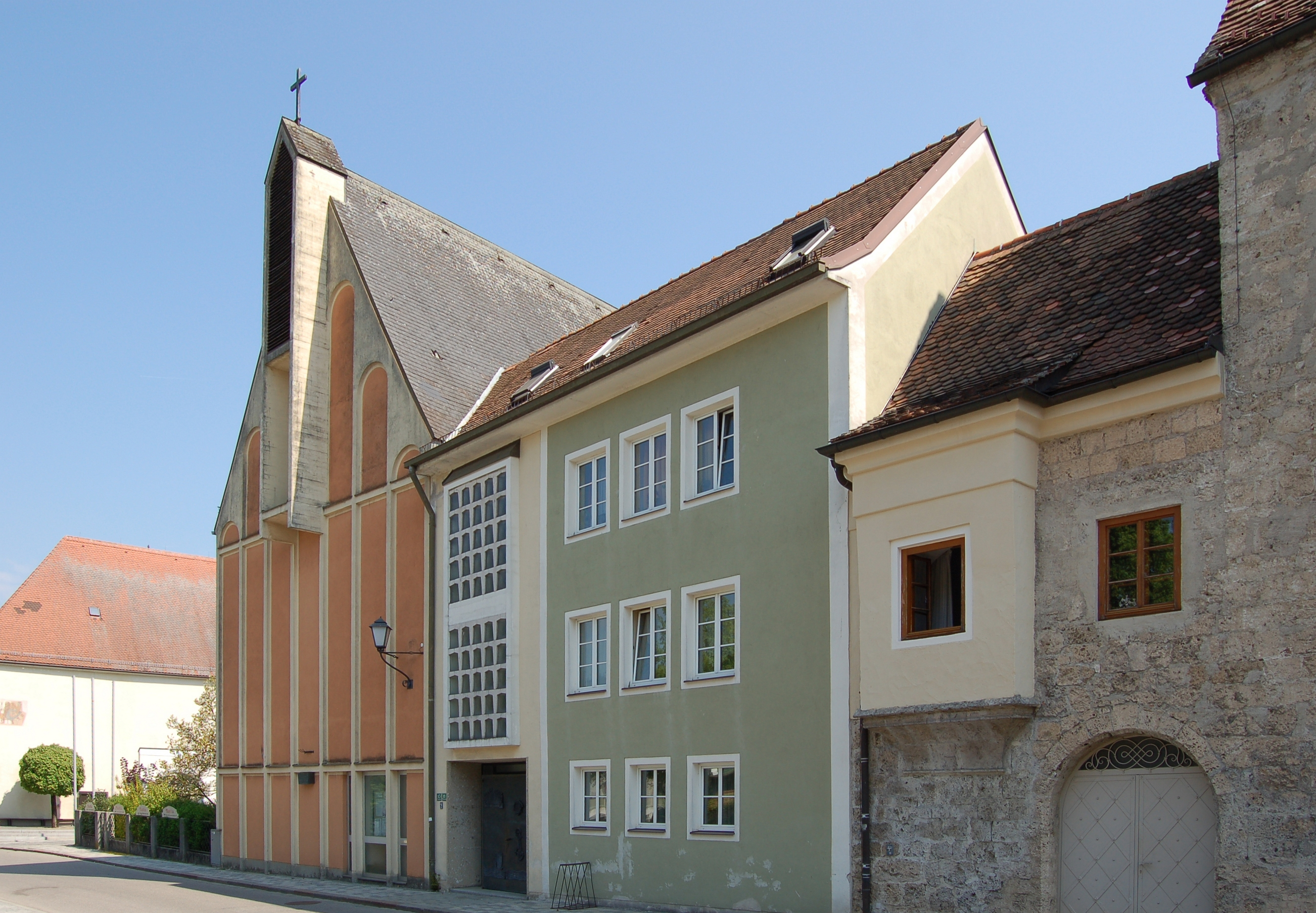 Evangangelische Pfarrkirche A.B. (Ehemaliger Schüttkasten) und Küsterhaus in der Theatergasse 11-13 in Braunau am Inn (Oberösterreich).